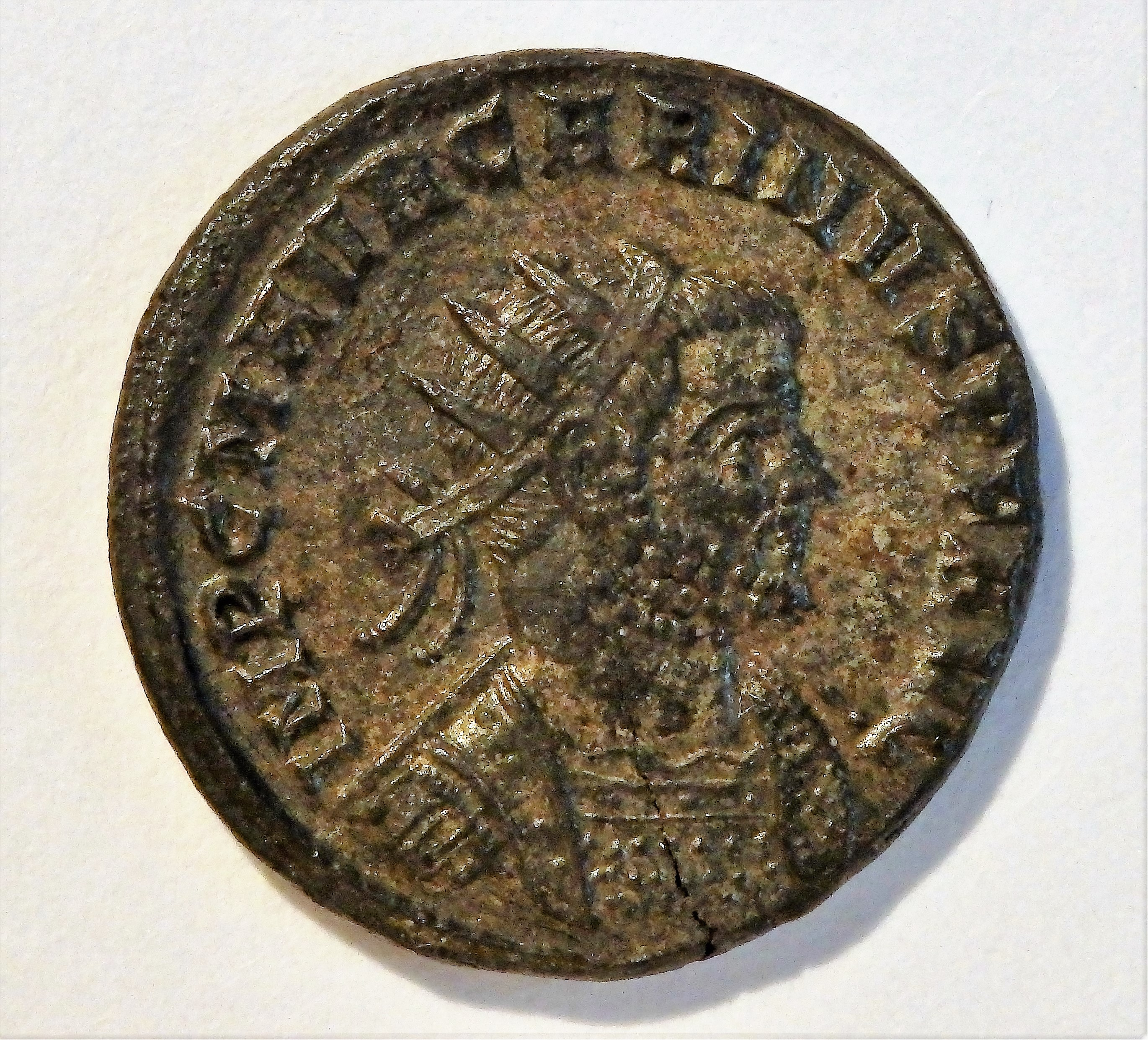 Antoninianus des Carinus, Kampmann 115.23